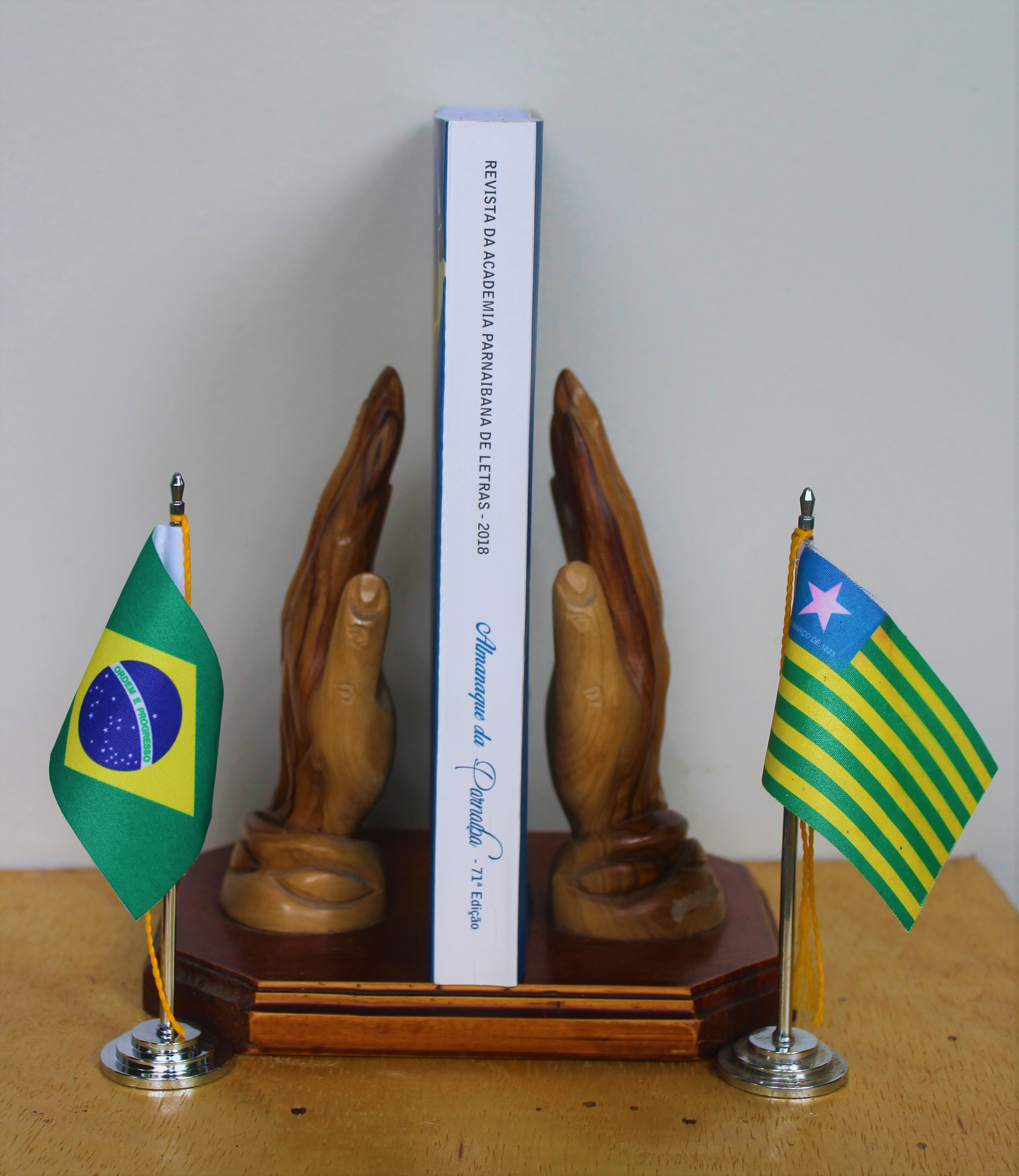 Imagem com o Almanaque da Parnaíba de 2018 em uma mão porta-livros.